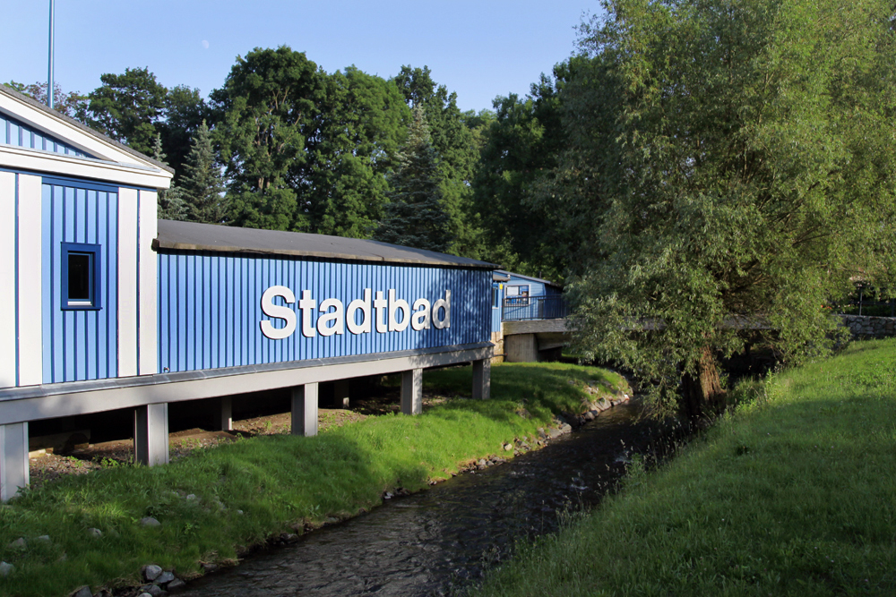 Eingangsbereich und Große Röder vor dem Stadtbad Radeberg